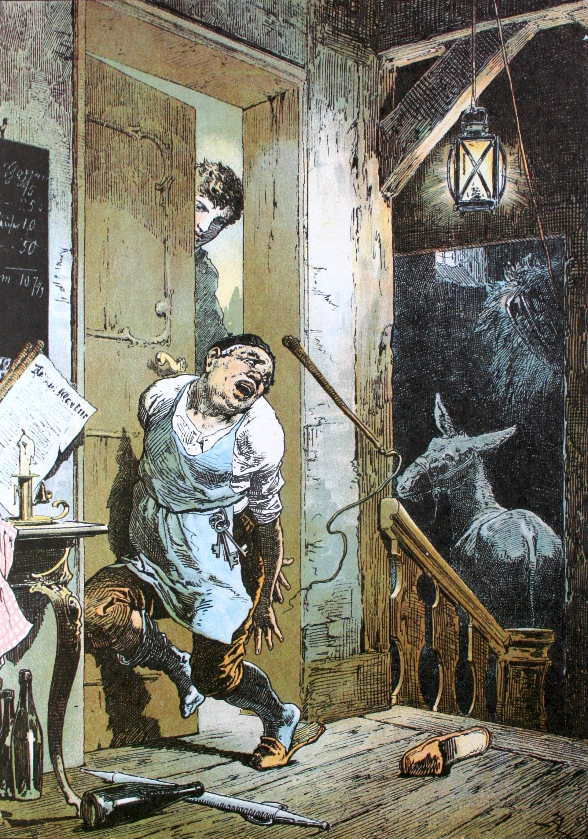 Tischlein deck dich; Darstellung von Alexander Zick (1845 - 1907)